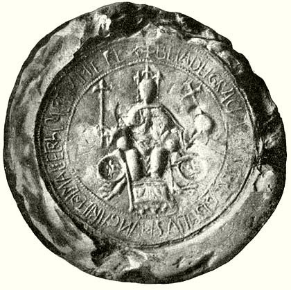 III. Béla pecsétjének körirata: BELA DEI GRACIA GEISSE REGIS FILIVS HUNGARIE DALMACIE CHROACIE RAMEQ[VE] REX.